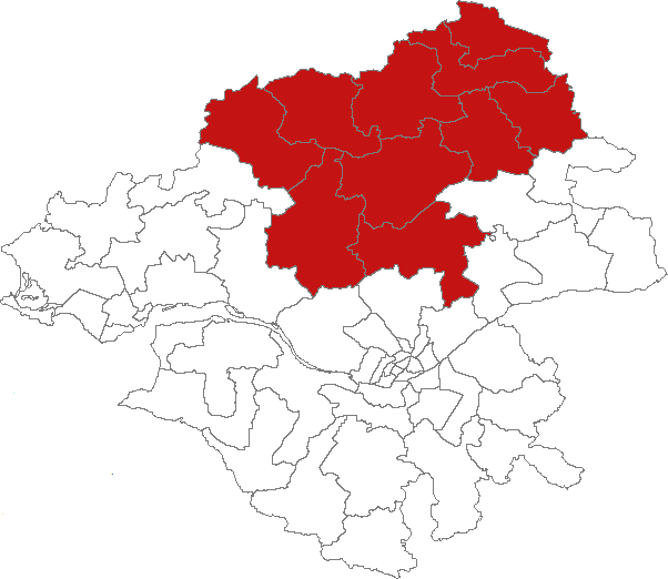 Carte de localisation de l'arrondissement de Châteaubriant (France, Loire-Atlantique)